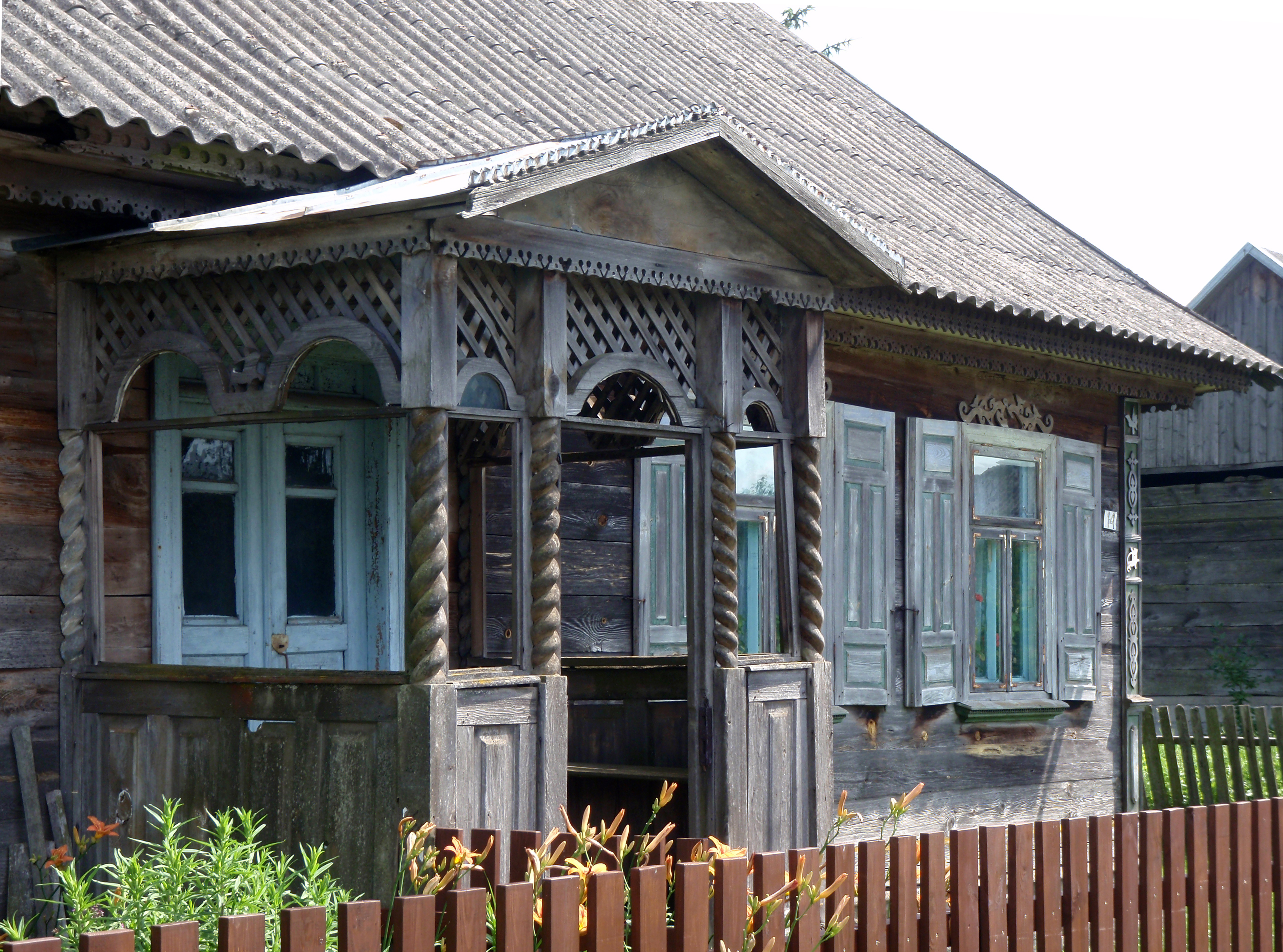 ganek zabytkowego domu nr 14 w Trywieży